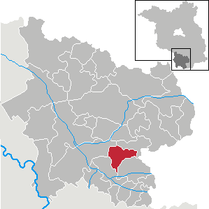 Hohenleipisch in Brandenburg (Country) - District Elbe-Elster